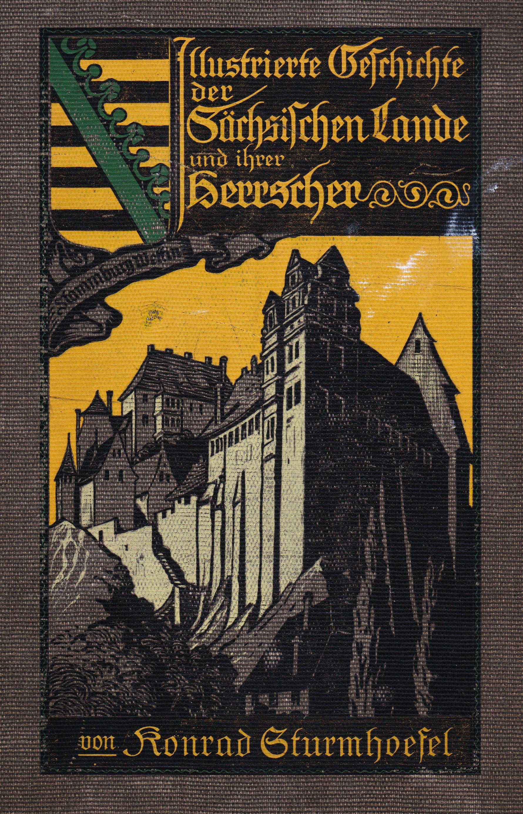 Buchcover mit Motiv Burg Wettin